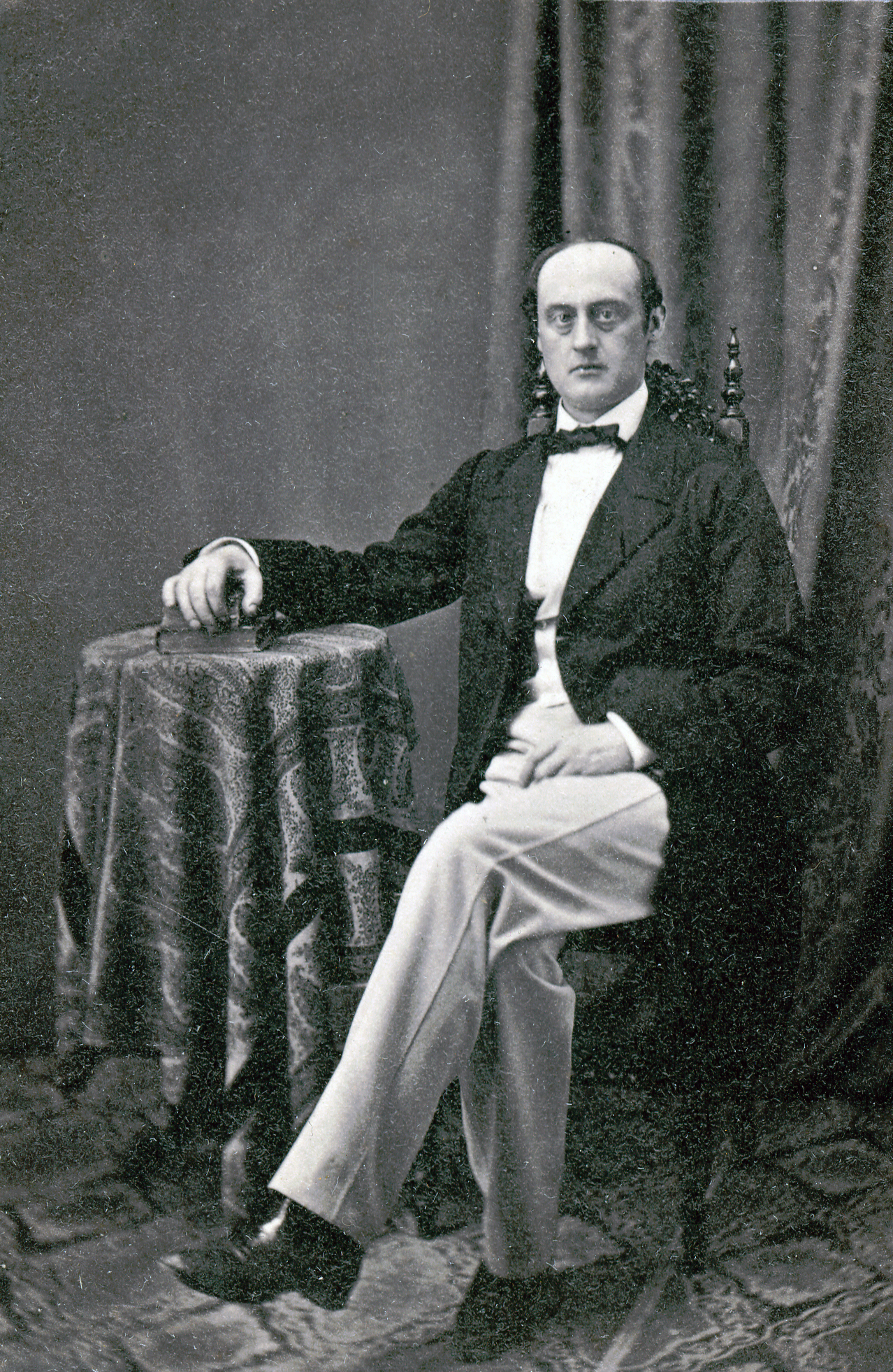 Gustaf Sandström, sångare vid Kungliga Operan 1862